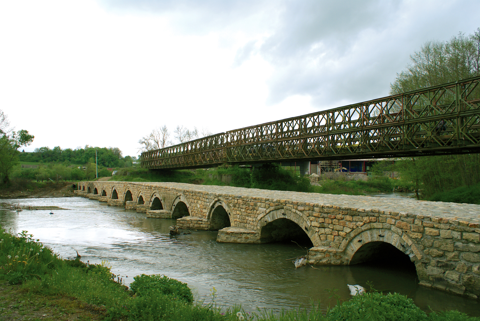 Ura e gurit në Zallç